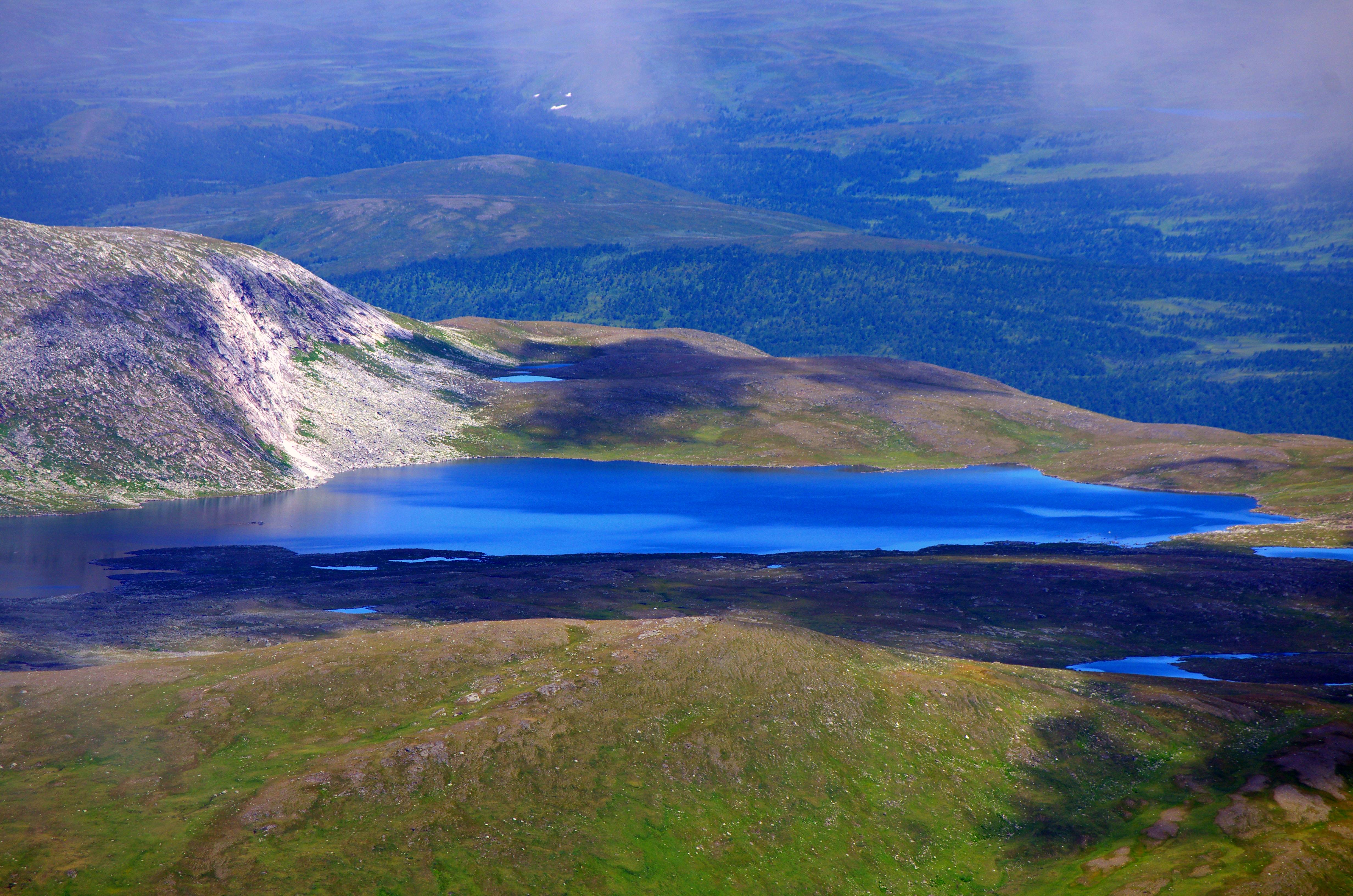 Rasjejaure eller Rássjajávrrie är en sjö i Sorsele kommun i Lappland i Sverige.